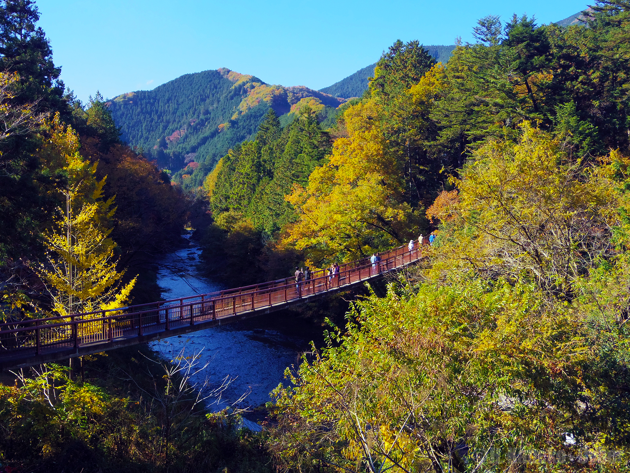 秋川と石舟橋〔いしぶねばし〕。あきる野市戸倉。上流・西の方向を見る。地図はこちら。